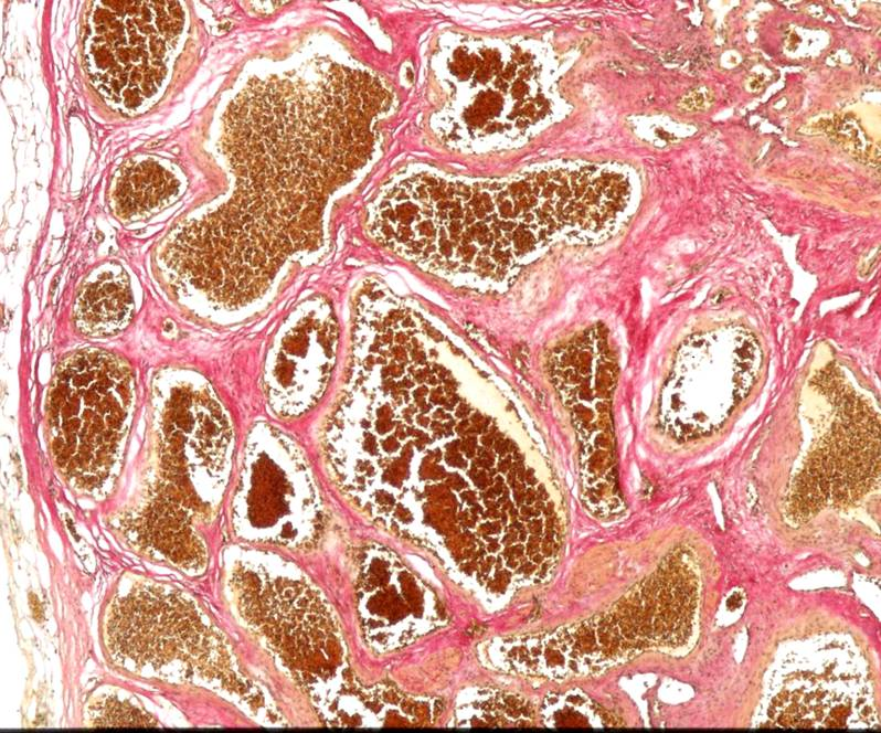 Histologie eins cavernösen Hämangioms (Cavernom). EVG-Färbung